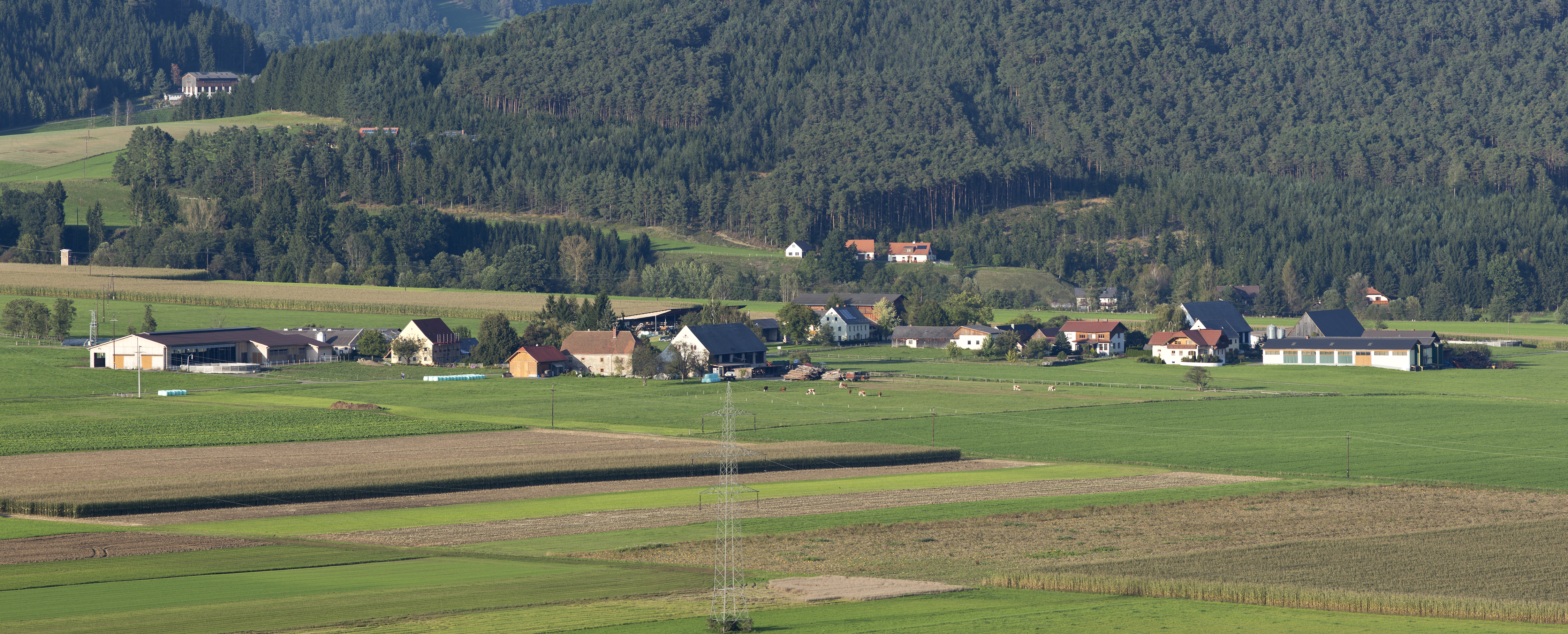 Die Orte Mitterfeld und Moos von Südwesten